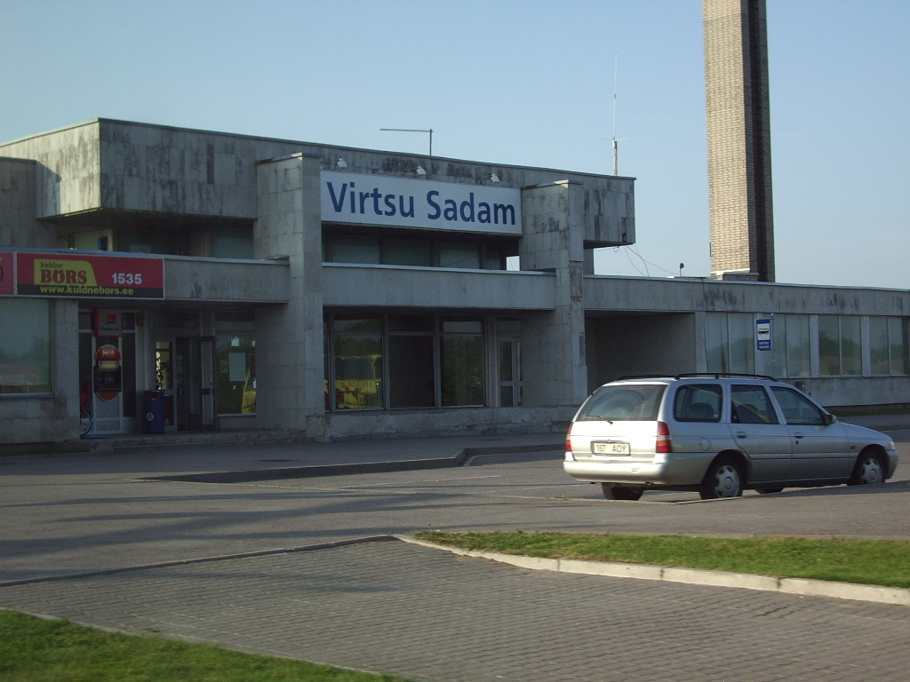 Virtsu Port, Lääne County, Estonia